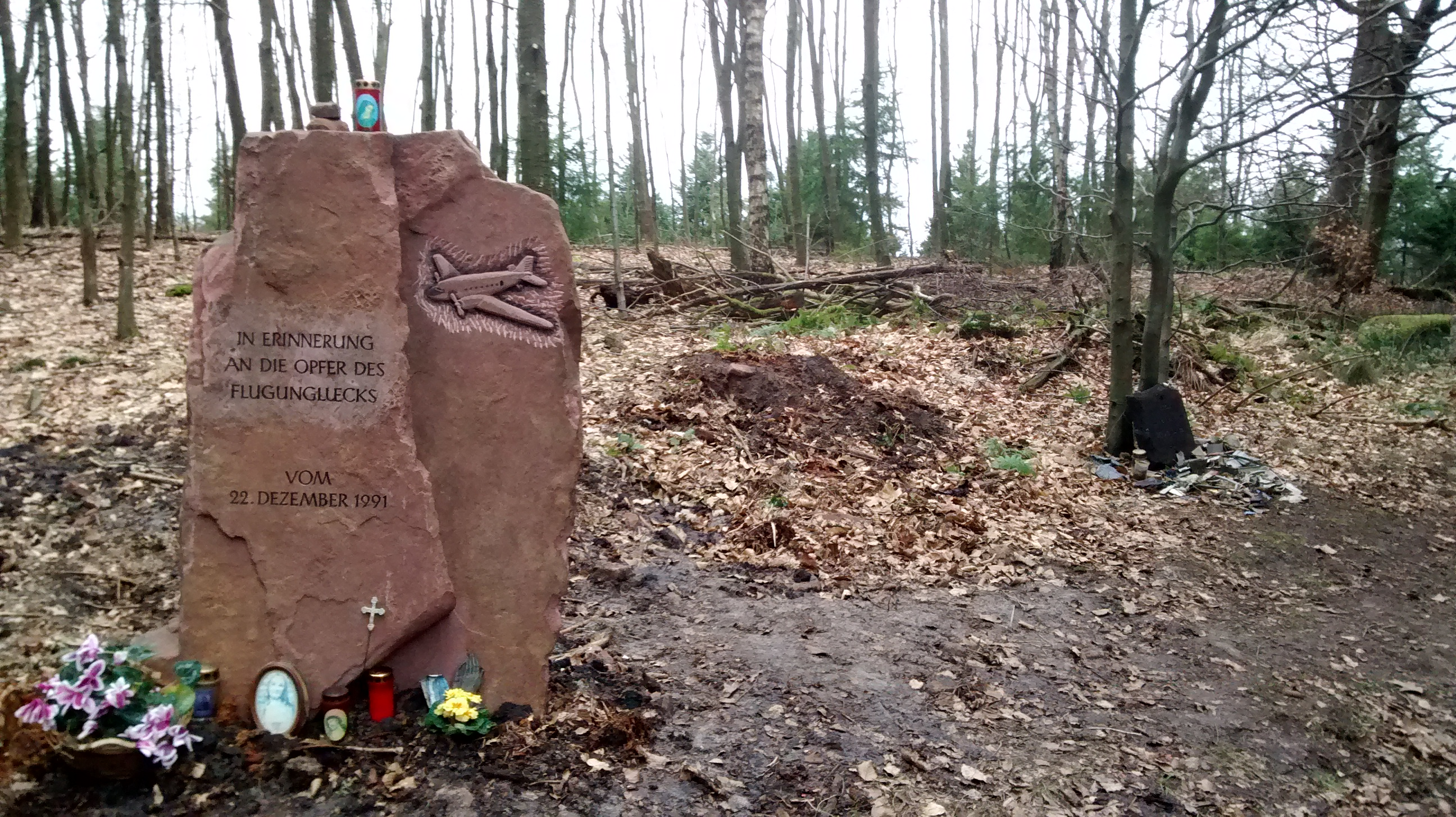 Gedenkstein an das Flugzeugunglück 1991 am Hohen Nistler